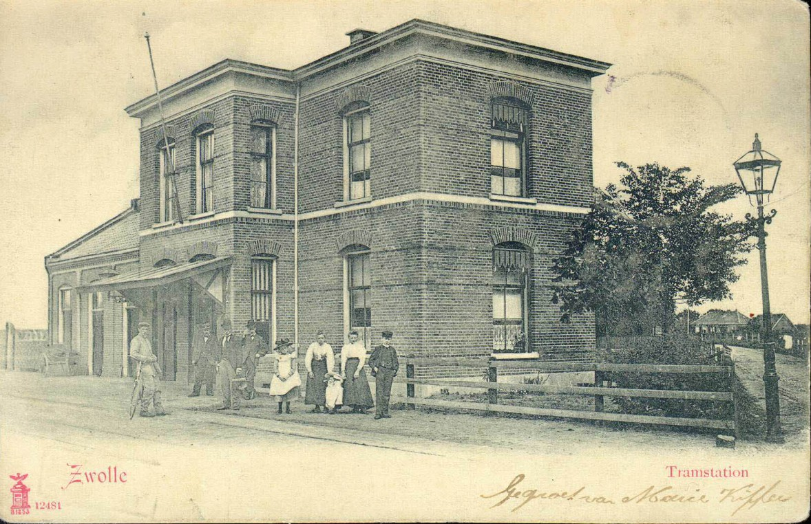 Station Vlasakkers van de Dedemsvaartsche Stoomtramweg-Maatschappij te Zwolle. Reproductie van kaart uit 1904. Fotograaf onbekend. Derhalve zijn de rechten vervallen. Dezelfde kaart staat ook in "Van stoomtram tot DVM" van JR van Bergen en H.Zandbergen uitgegeven door de Bataafsche Leeuw in 1985 (ISBN:9067070769) op blz. 28. De opgave van het jaartal is uit dit boek afkomstig, maar ook hier is geen fotograaf vermeld, ook niet bij de "verantwoording" achterin het boek. Volgens de website van het Historisch Centrum Overijssel is het jaar van uitgave 1900 - 1902 en is de fotograaf onbekend: pd-old derhalve.